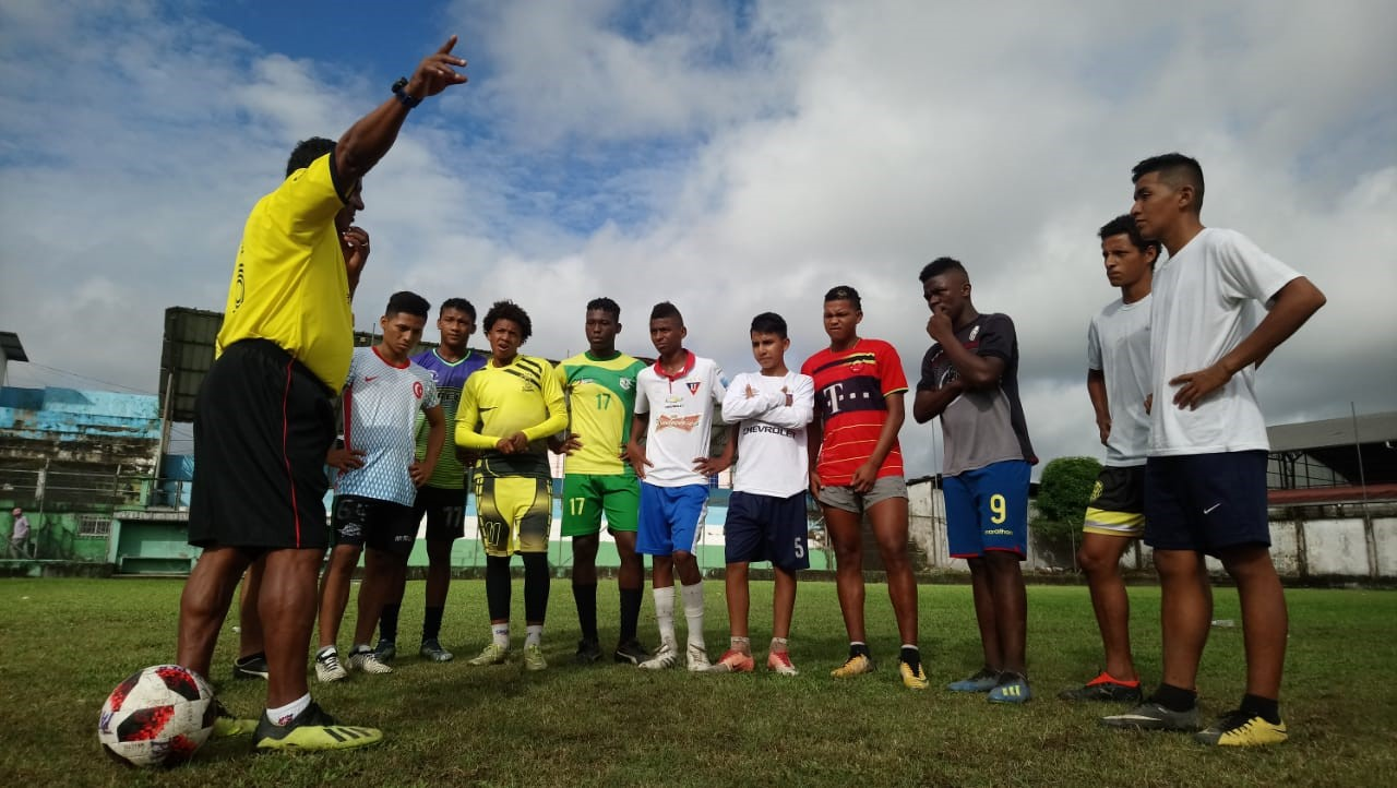 Pedro Pablo Perlaza Concha training in Lago Agrio